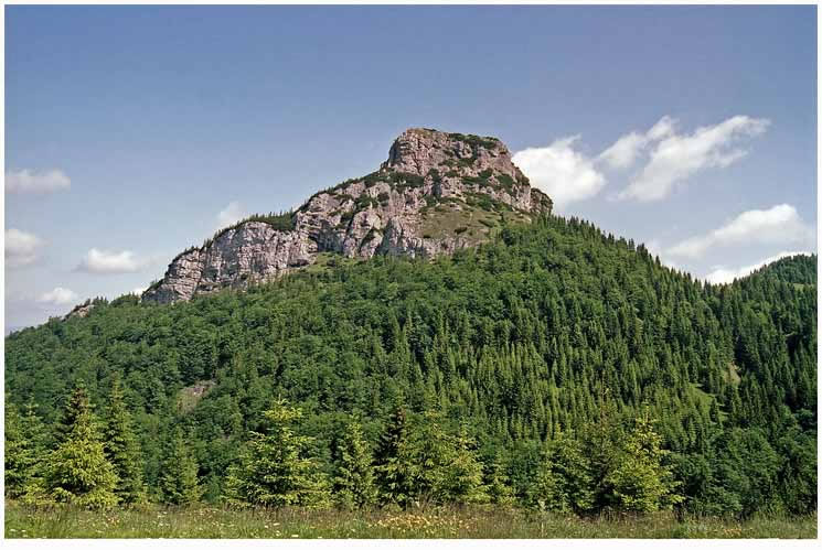 Malý Rozsutec, view from gap Pod Tanečnicou, Malá Fatra, district Žilina, Slovakia Autor:Prazak date: 28. 6. 2006